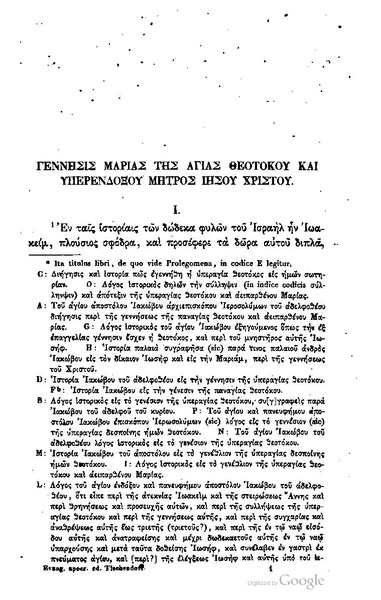 Γέννησις Μαρίας της αγίας Θεοτόκου και υπερενδόξου μητρός Ιησού Χριστού (Протоевангелие Иакова) в книге Constantin von Tischendorf Evangelia apocrypha 1853